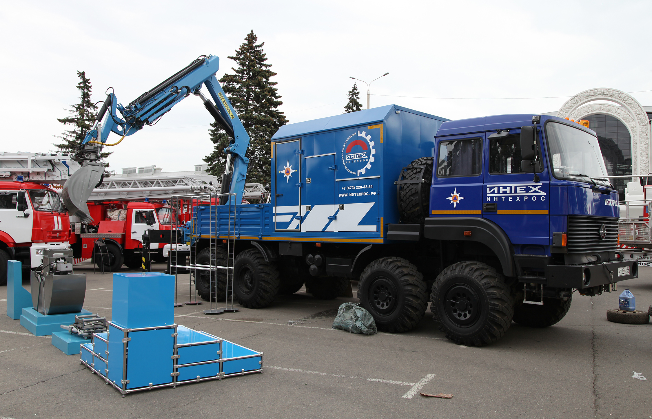 Инженерно-машинизированный комплекс ИНТЕХ (INTEKh engineering vehicle)